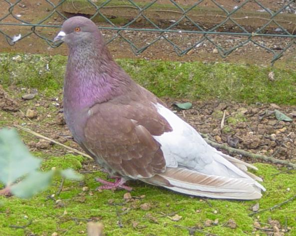 Colom de Casta Grossa a Natura Parc, Santa Eugènia, Mallorca.